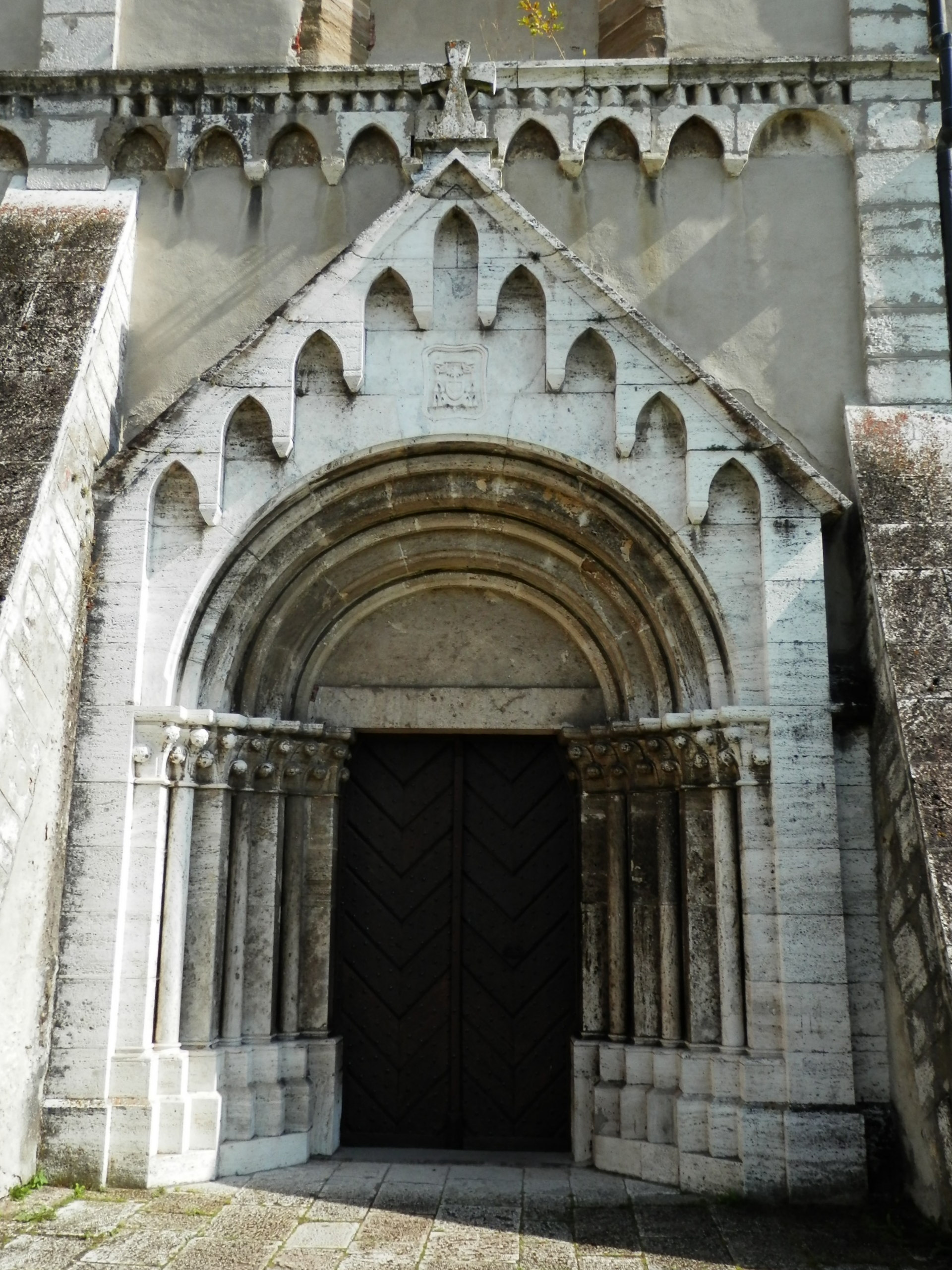 Pôvodne románska katedrála svätého Martina z roku 1200, Spišská Kapitula-Spišské Podhradie, okres Levoča. Vchod do katedrály zo západu.